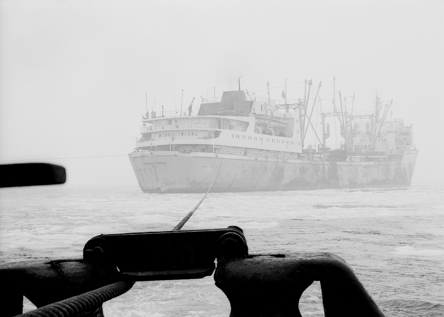 „Stanisław Moniuszko“ Eesti kalapüügibaaslaeva pukseerimine 1975